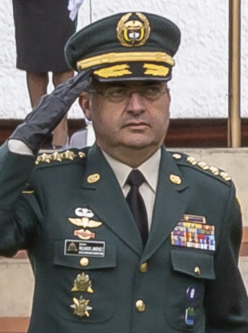 General Ricardo Jiménez Mejía, Jefe de Estado Mayor Conjunto de las Fuerzas Militares de Colombia.